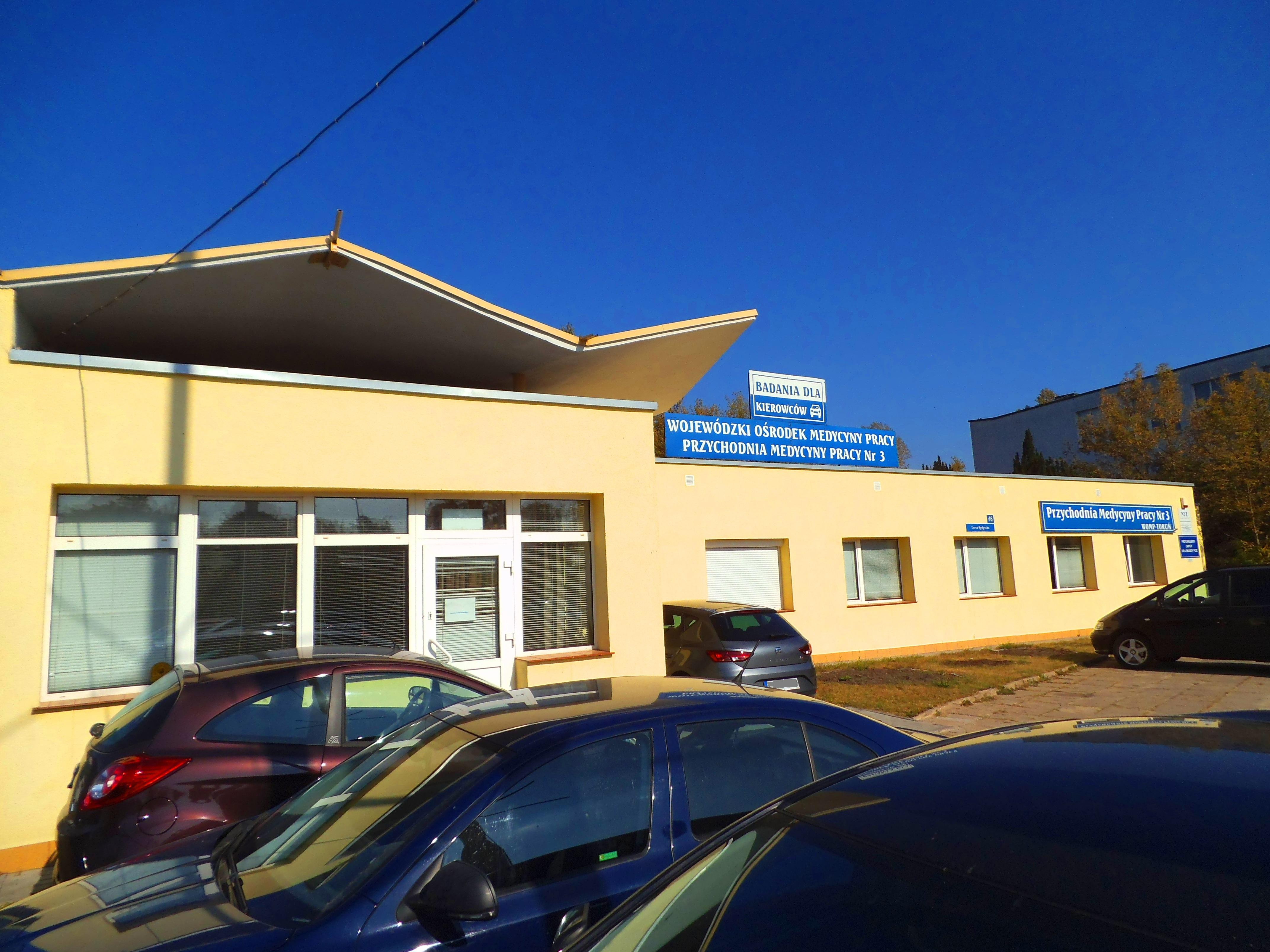 Dawna przychodnia zakładowa Merinotexu w Toruniu